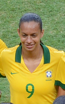 Selecionado feminino do Brasil, campeãs do Torneio Internacional de Brasília - 2013